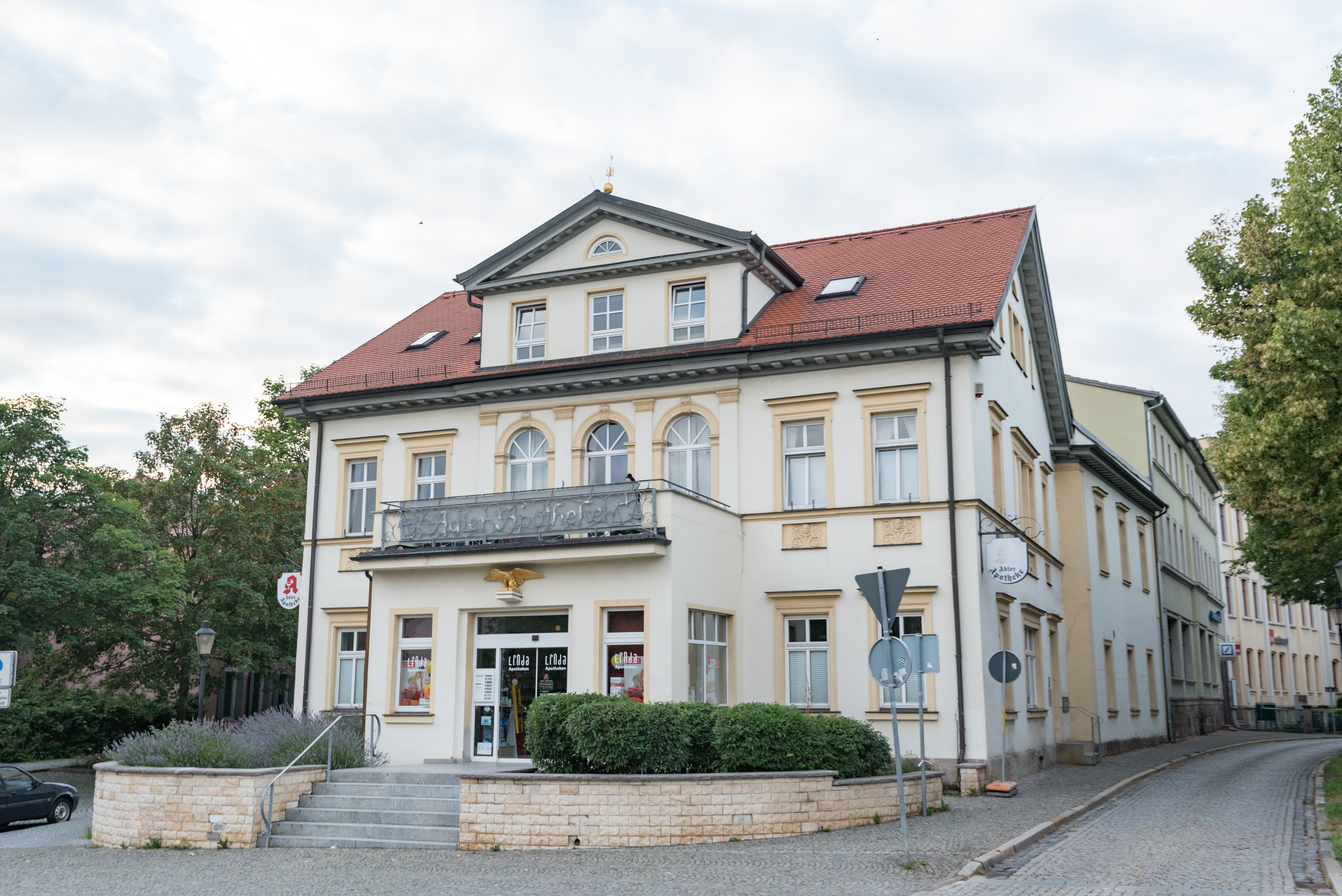 Naumburg (Saale), Kramerplatz 4